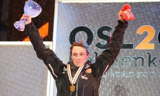 Eric Frenzel podczas ceremonii medalowej po konkursie indywidualnym (Gundersen - skok na obiekcie HS106 + bieg na 10 kilometrów) w ramach Mistrzostw Świata w Narciarstwie Klasycznym 2011 w Oslo.